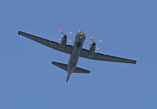 Military parade, Avenue des Champs-Élysées, 14 July 2006